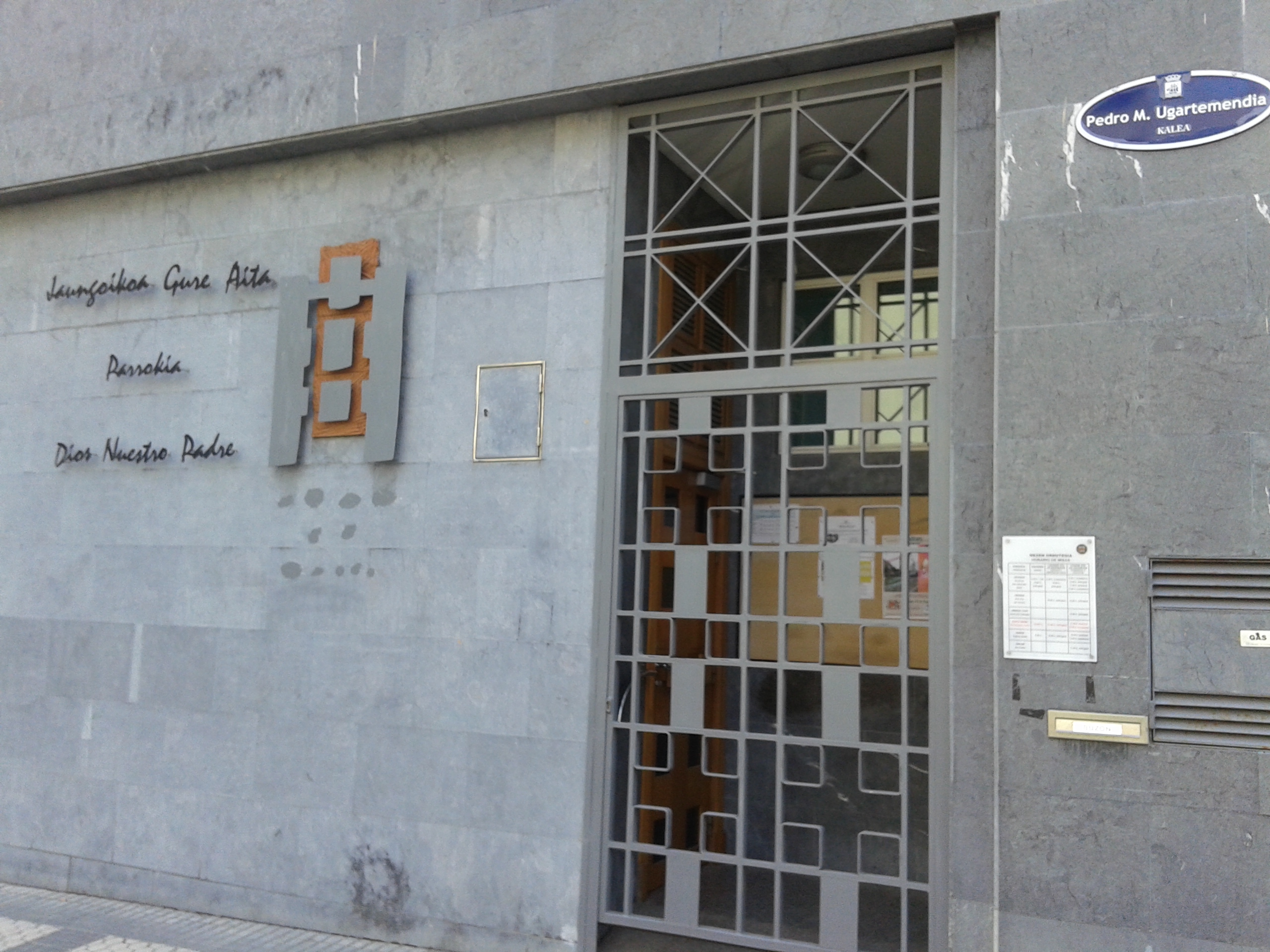 Donostiako auzo horren eliza katolikoa.